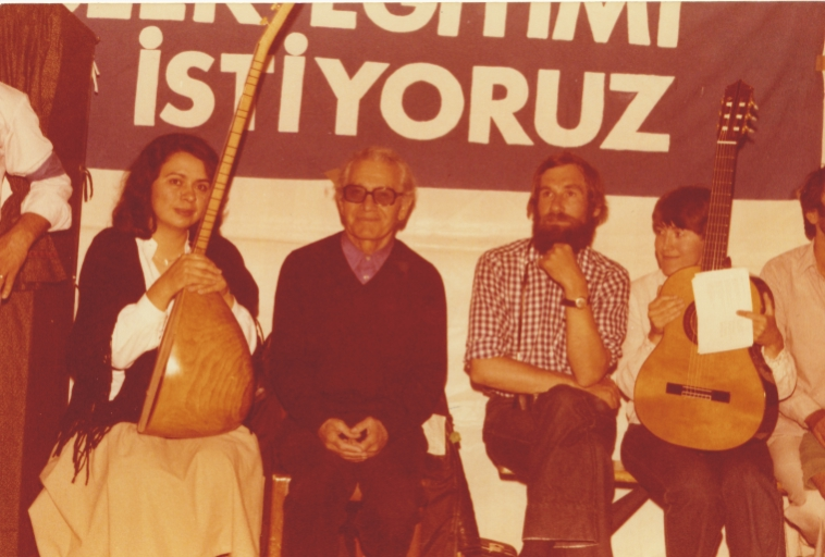 Almanya 1.Gençlik Festivali Temmuz 1979 da Oğuz Gemalmaz tarafından çekilen resim.